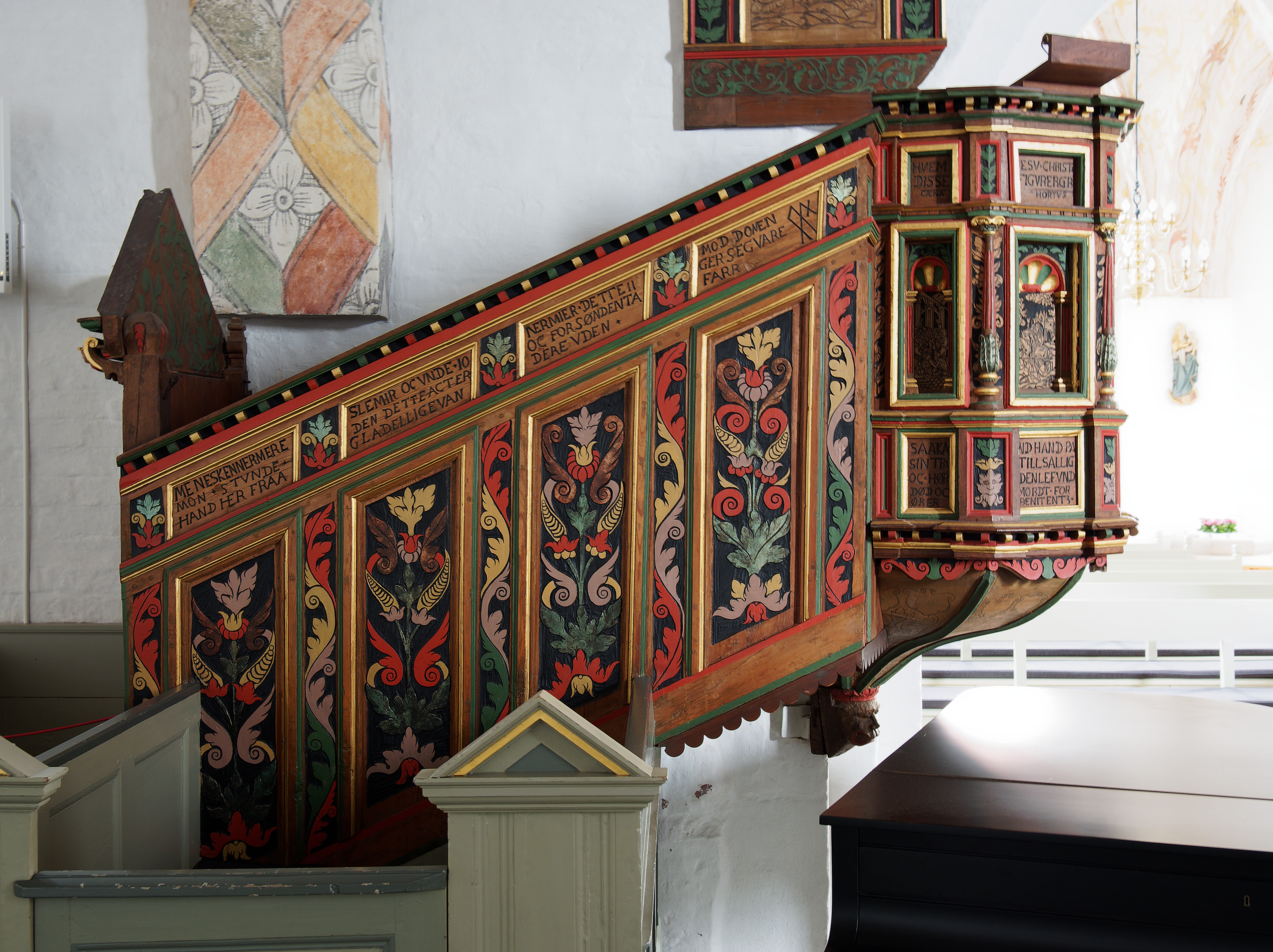 Die Marienkirche in Sæby (Frederikshavn Kommune), errichtet im 13 Jahrhundert, Kanzel.